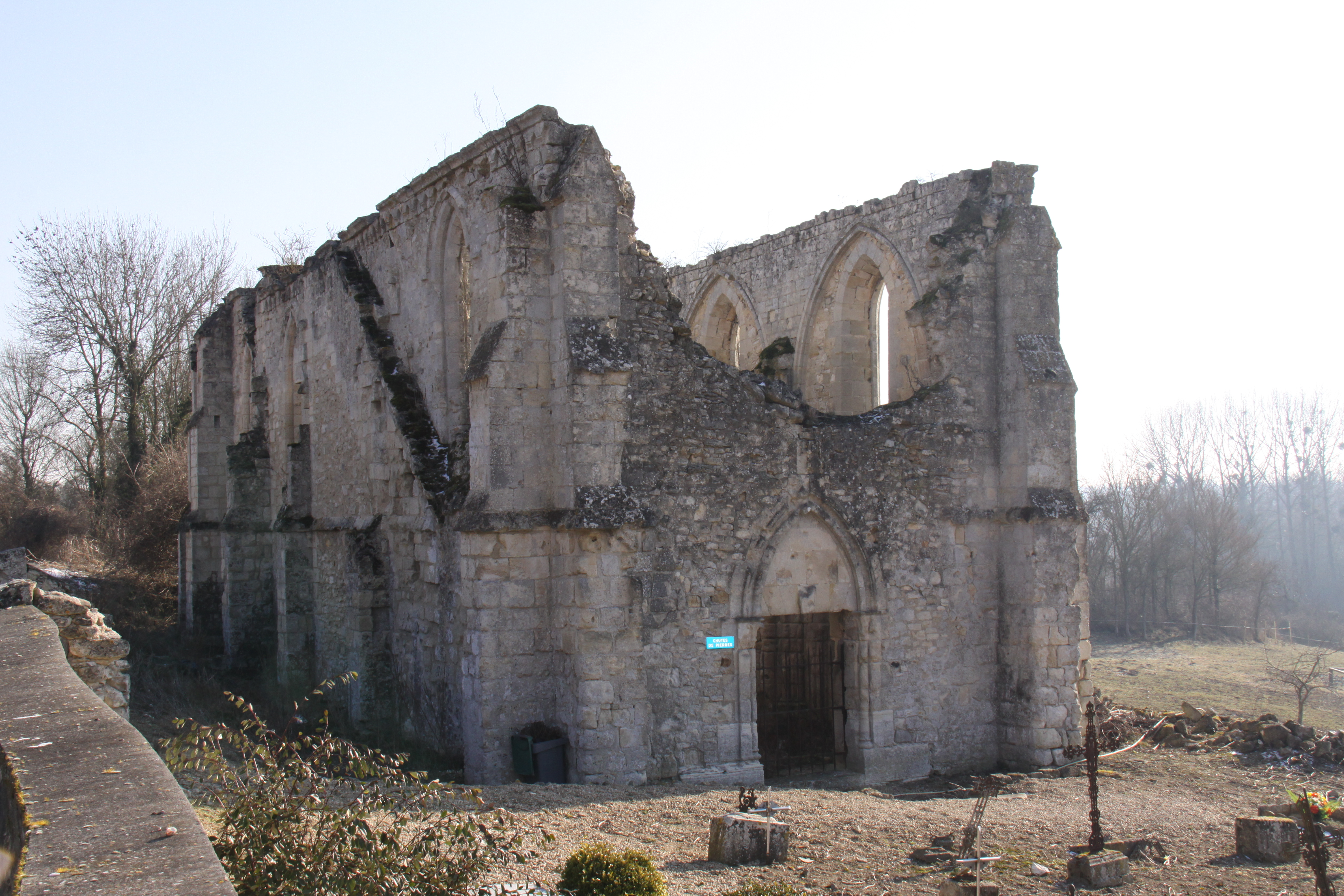 Vue de la rue de Cointicourt